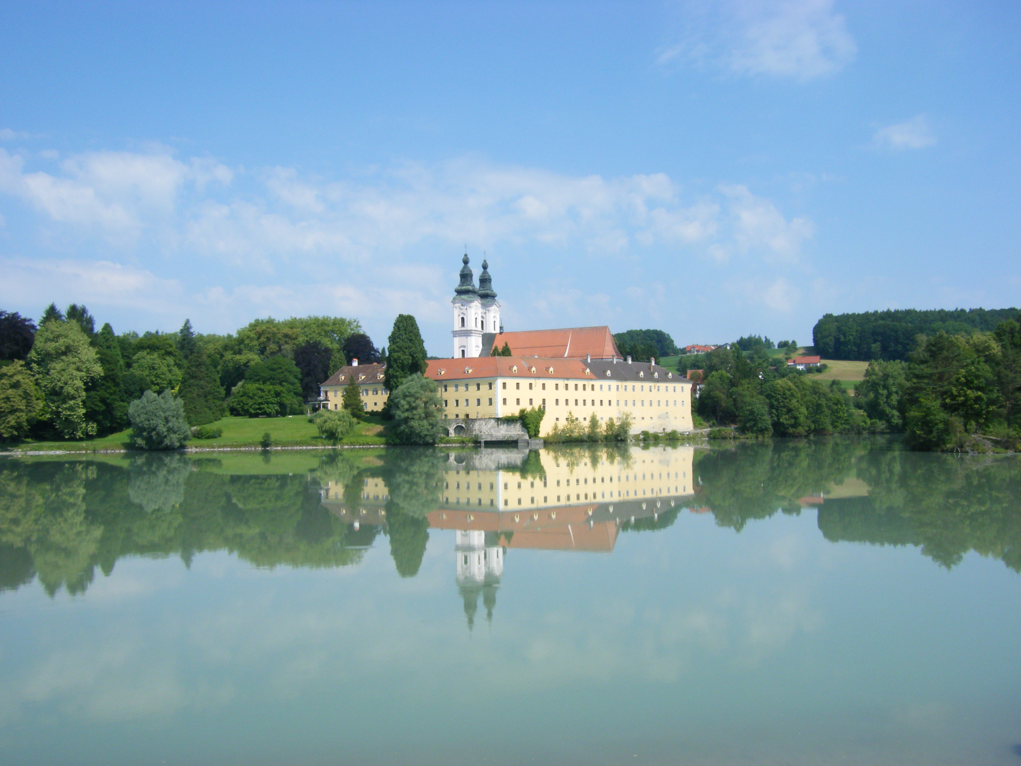 Blick von der österreichischen Innseite auf die ehemalige Benediktinerabtei Vornbach, Anfang 18. Jahrhundert erbaut, jetzt Pfarrhof und auf die ehemalige Abteikirche, seit 1803 katholische Pfarrkirche Mariä Himmelfahrt. Vornbach ist ein Ortsteil der Gemeinde Neuhaus am Inn im niederbayerischen Landkreis Passau.This is a photograph of an architectural monument. und 32